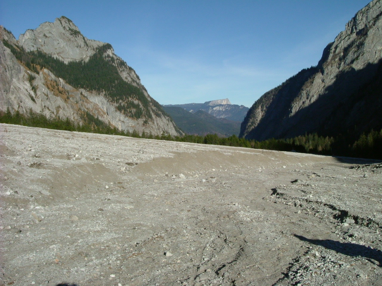 Oberes Wimbachtal mit mächtigen Schuttströmen (Wimbachgries)